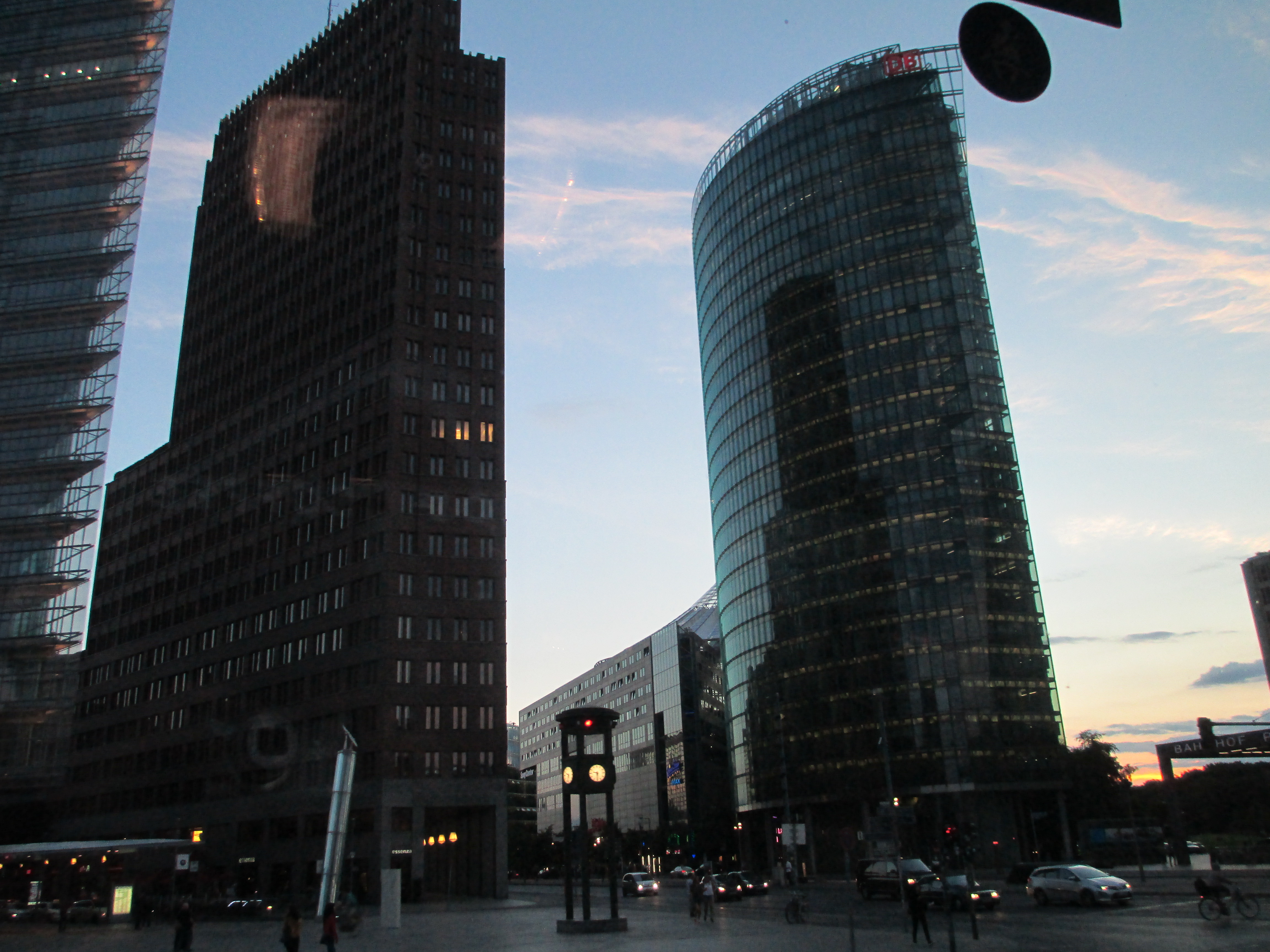 כיכר פוטסדאם בלילה